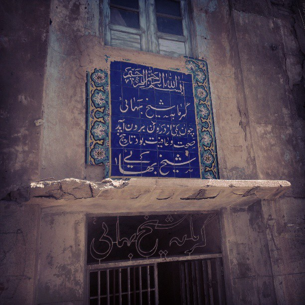 گرمخانه شیخ بهائی واقع در اصفهان